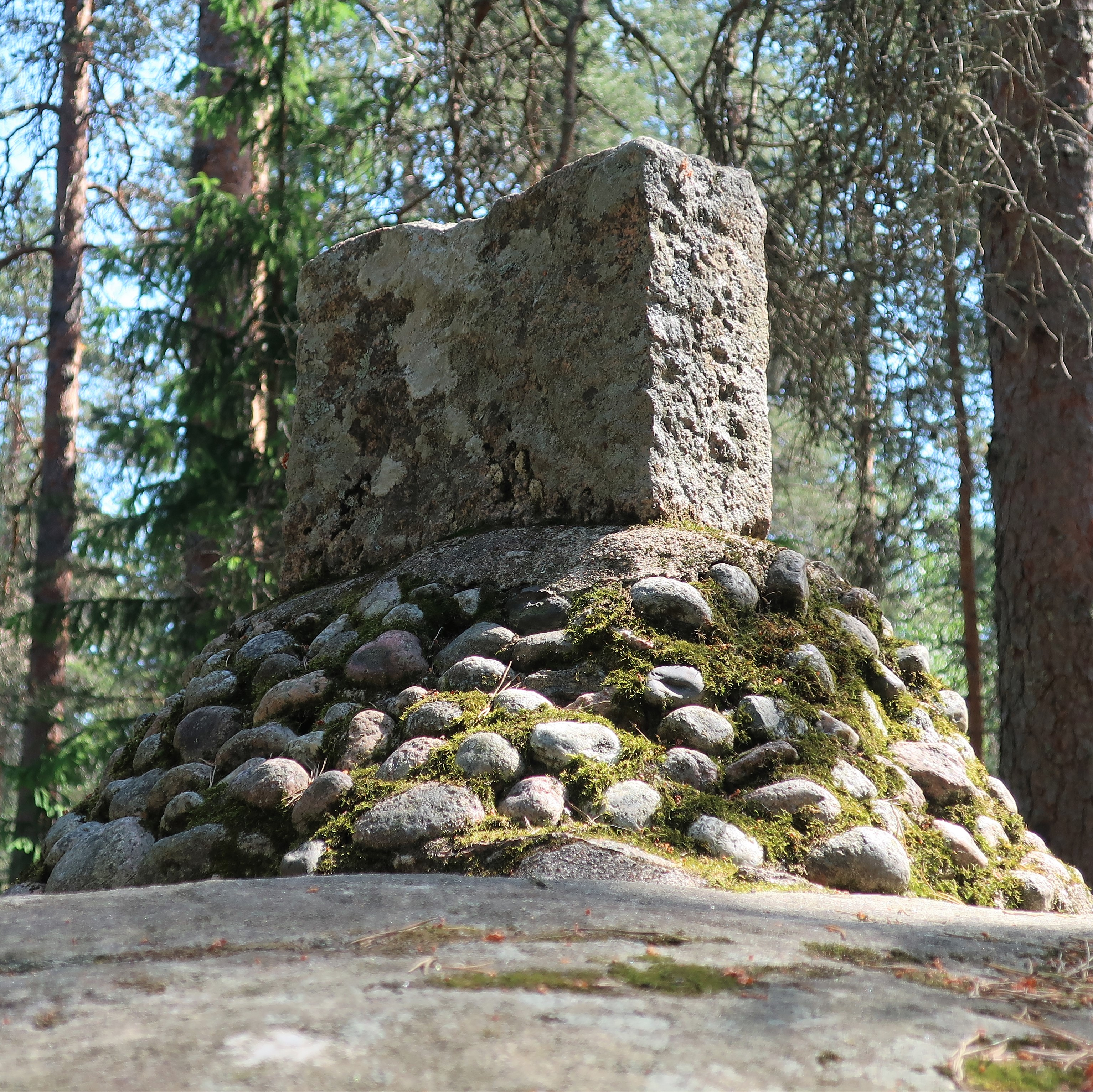 kalliolla sijaitseva kiviin perustettu graniittipaasi, jonka kiiltävällä puolella teksti "Havaitse Jumala luonnossa – Se Gud i naturen"